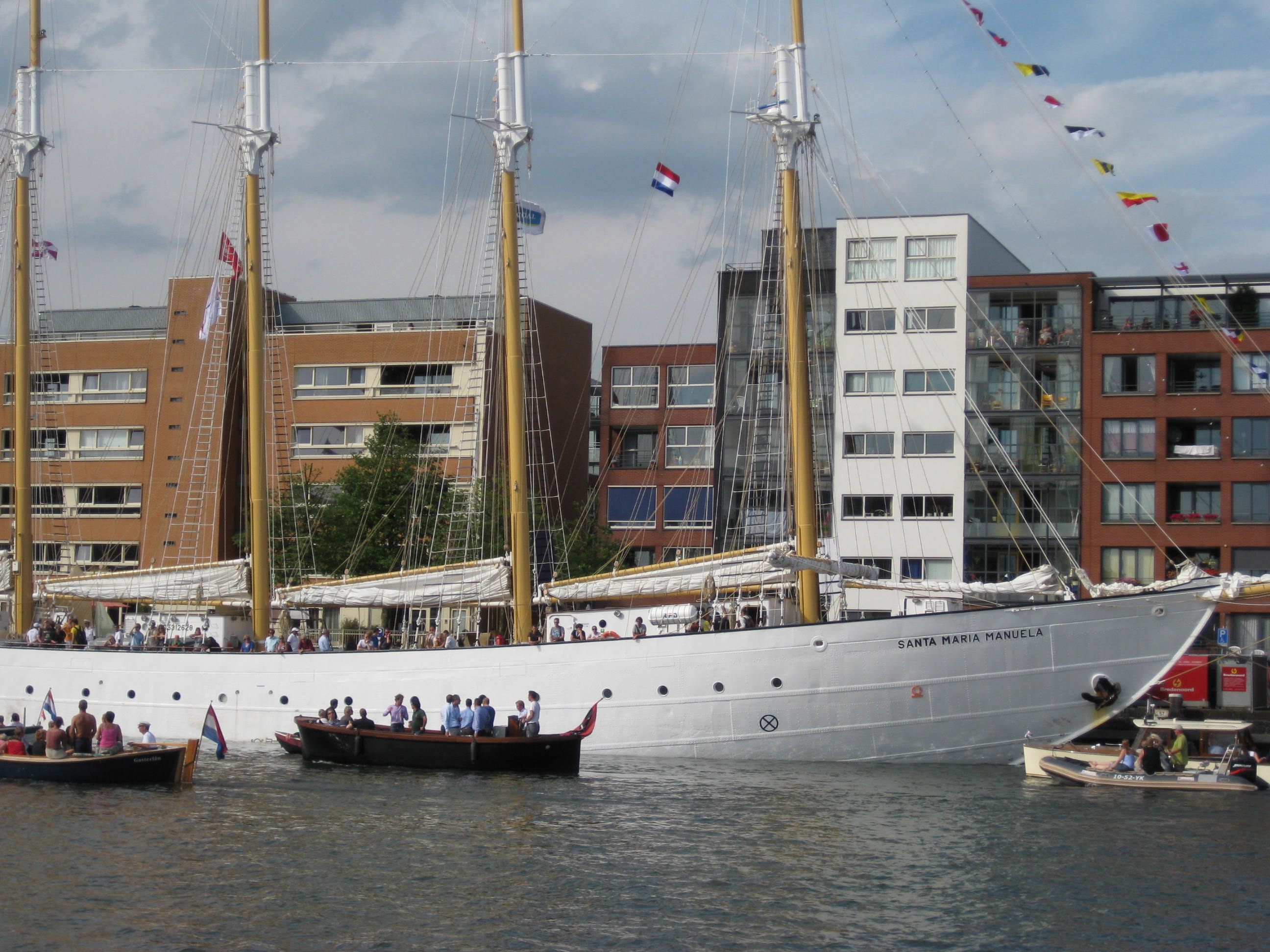 Zeilschip de Santa Maria Manuela tijdens Sail Amsterdam 2010